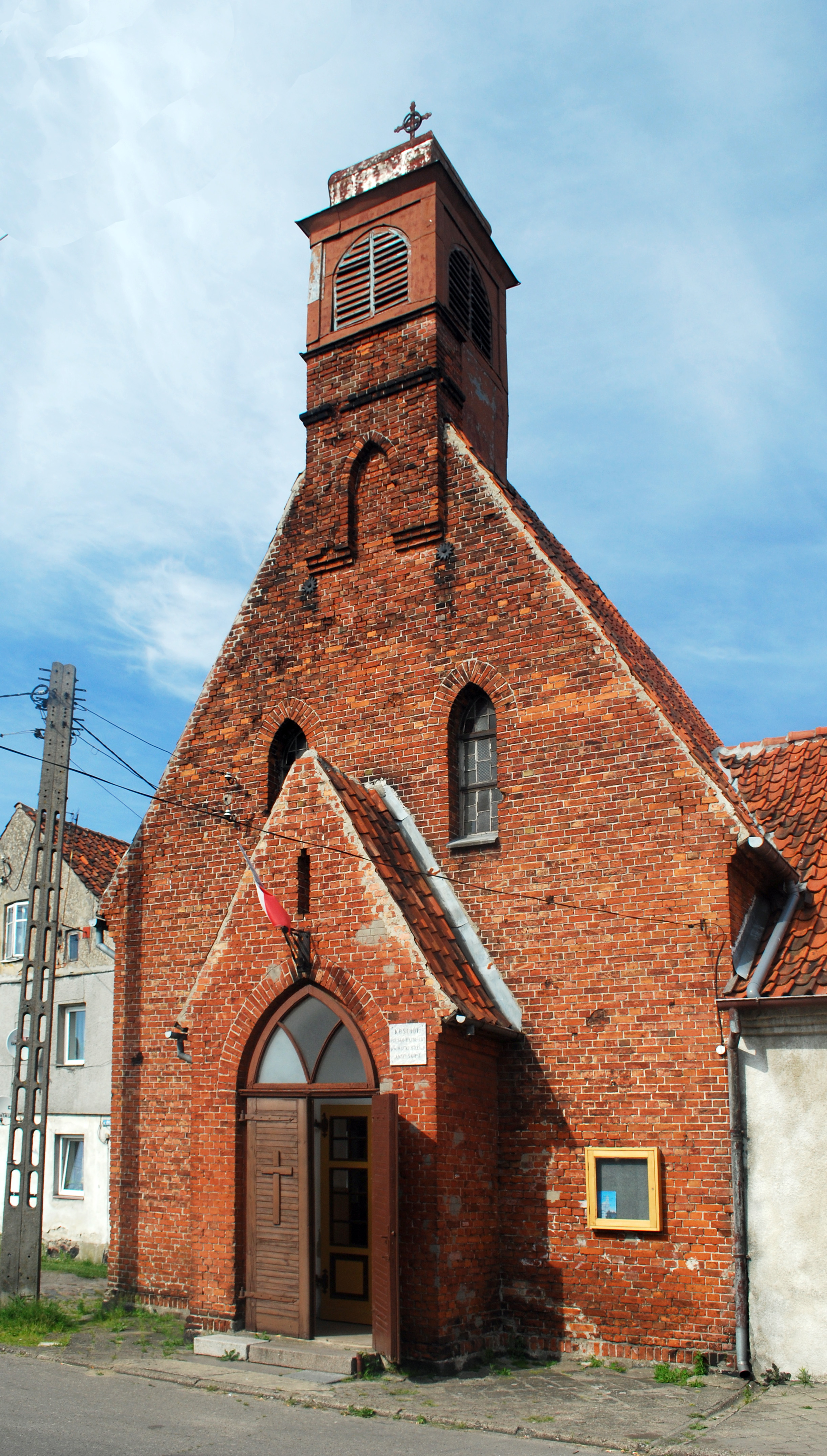 Kościół polsko-katolicki Tolkmicku.